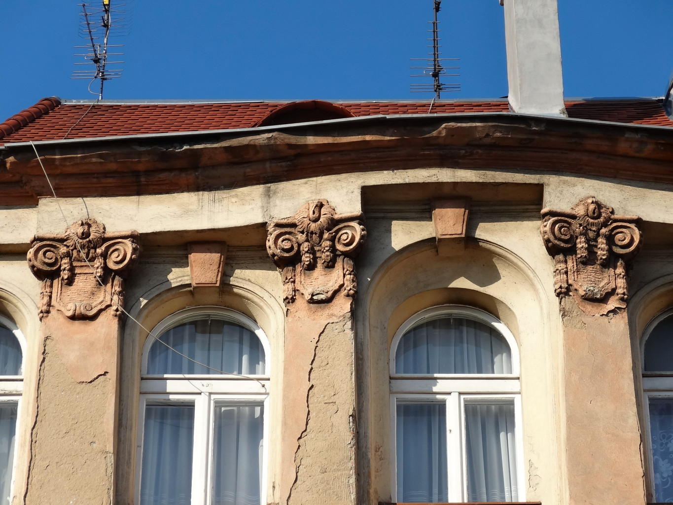 Kamienica przy ul. Dworcowej 41 w Bydgoszczy, róg ul. Marcinkowskiego